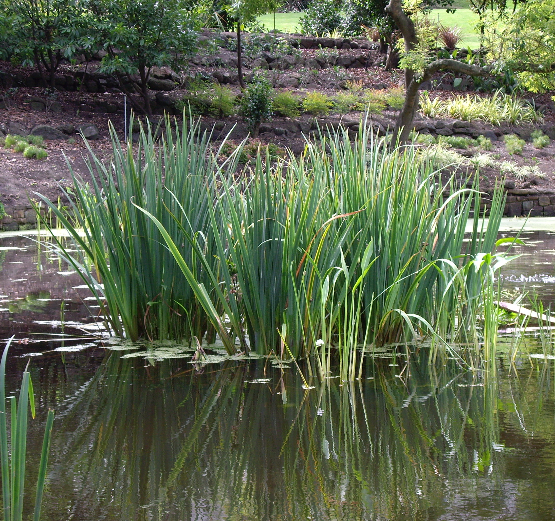 Water Gardent Plants